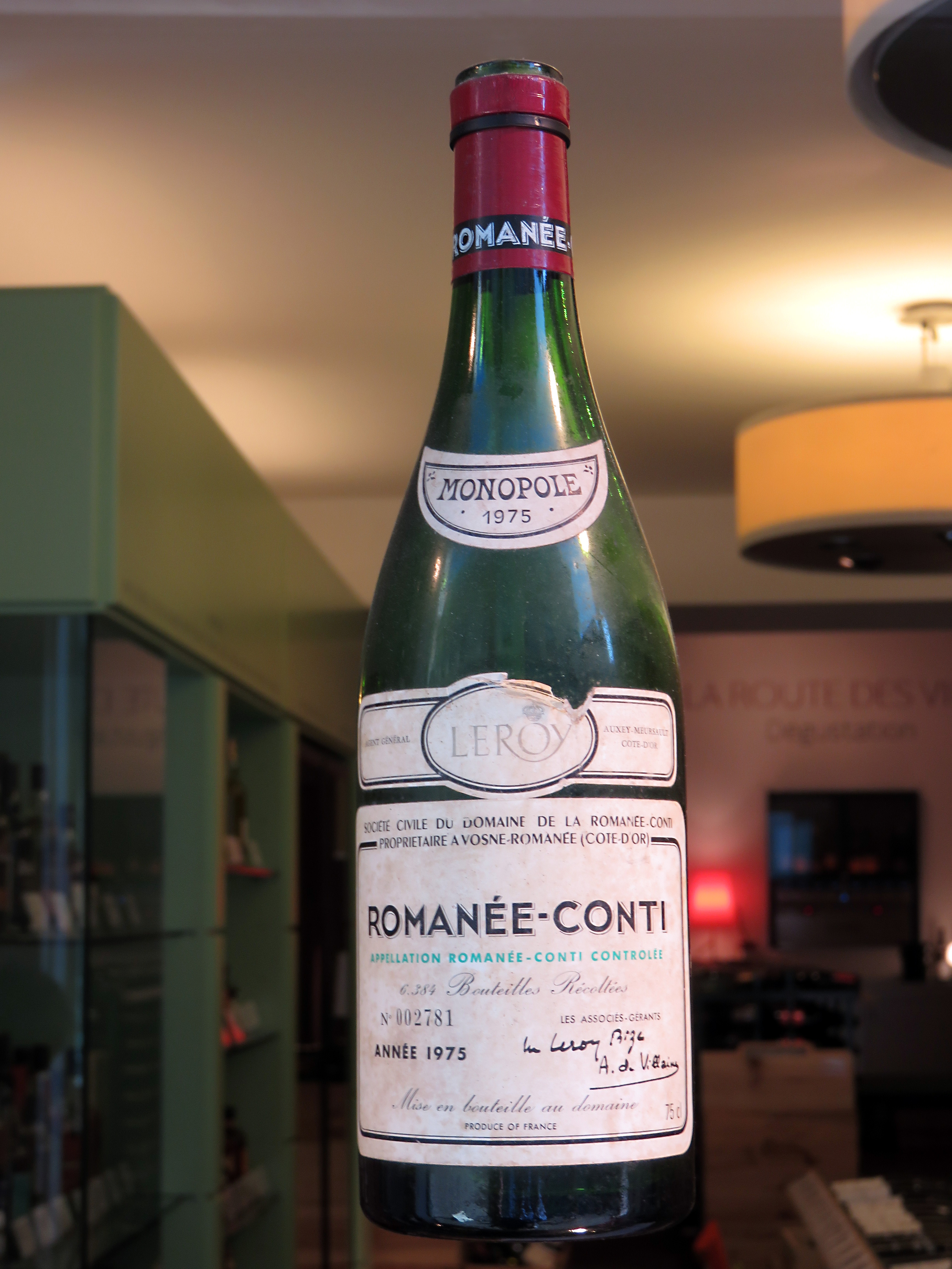 La Romanée-Conti - Leroy - 1975